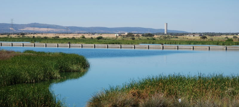 Vista del Embalse de Arrocampo en Saucedilla (Cáceres)